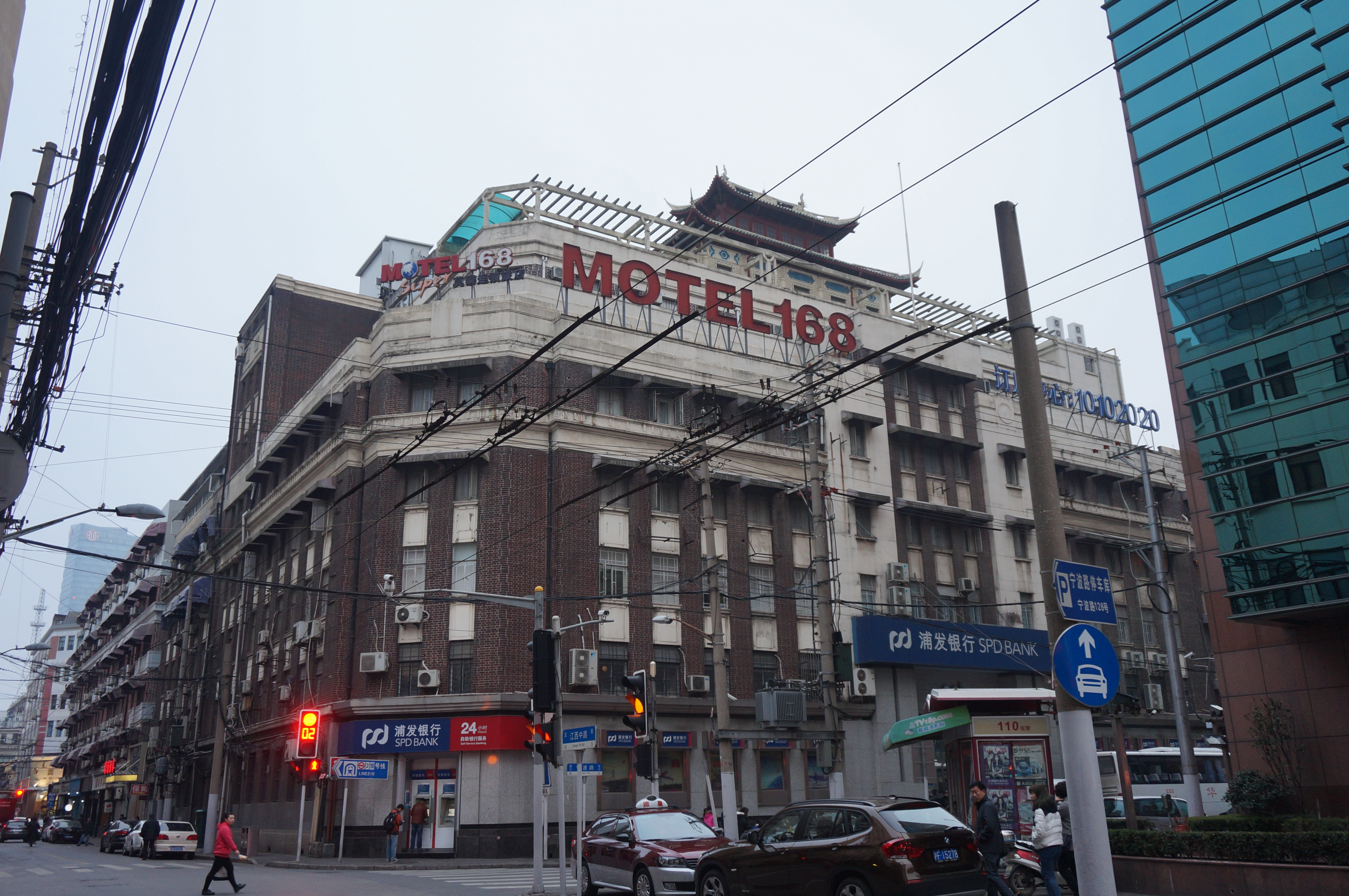 中文（中国大陆）: 上海原上海商业储蓄银行大楼